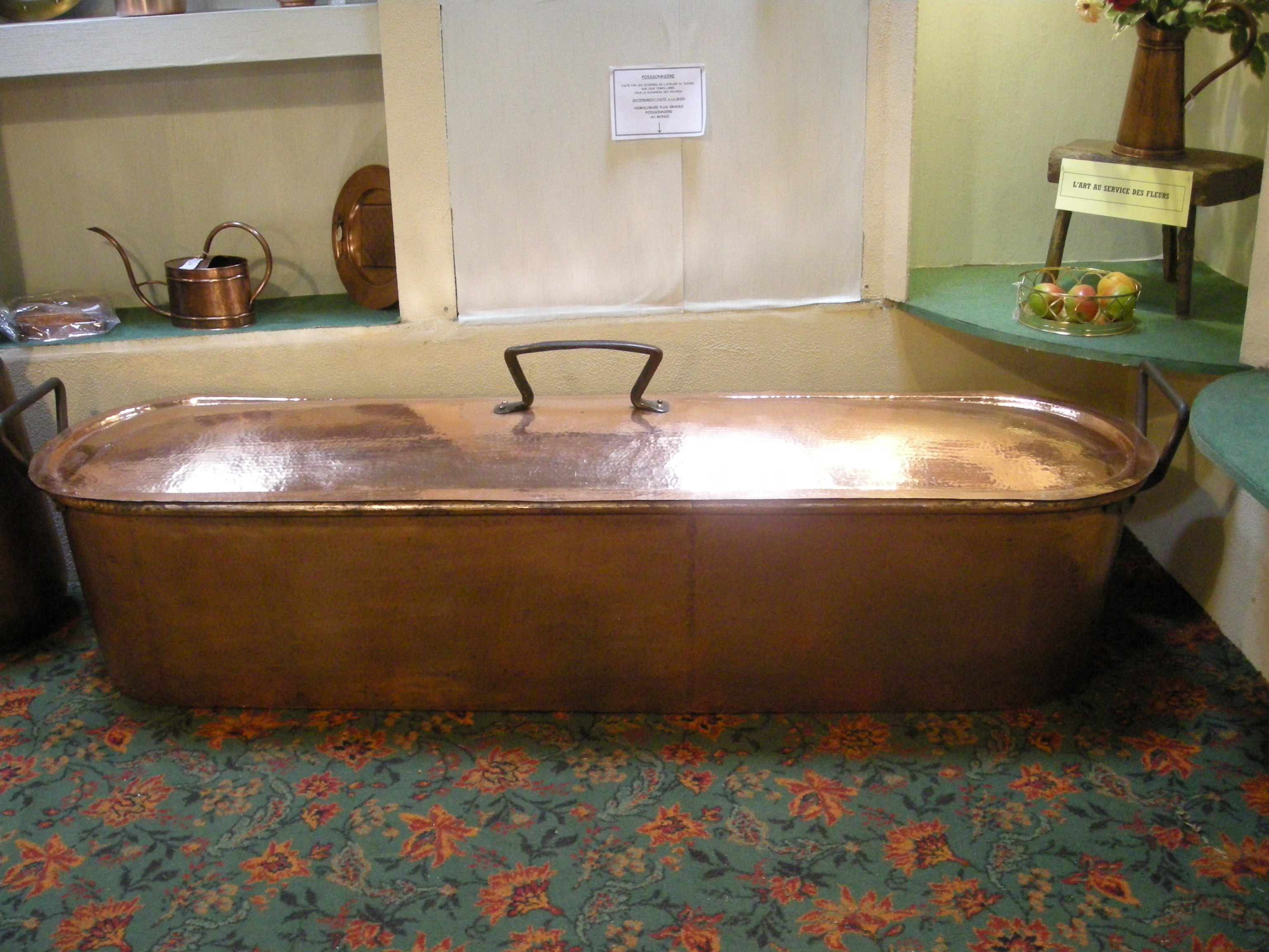 Poissonnière en cuivre ("la plus grande du monde", Livre Guinness des records) à l'Atelier du Cuivre de Villedieu-les-Poêles (Manche, Normandie)